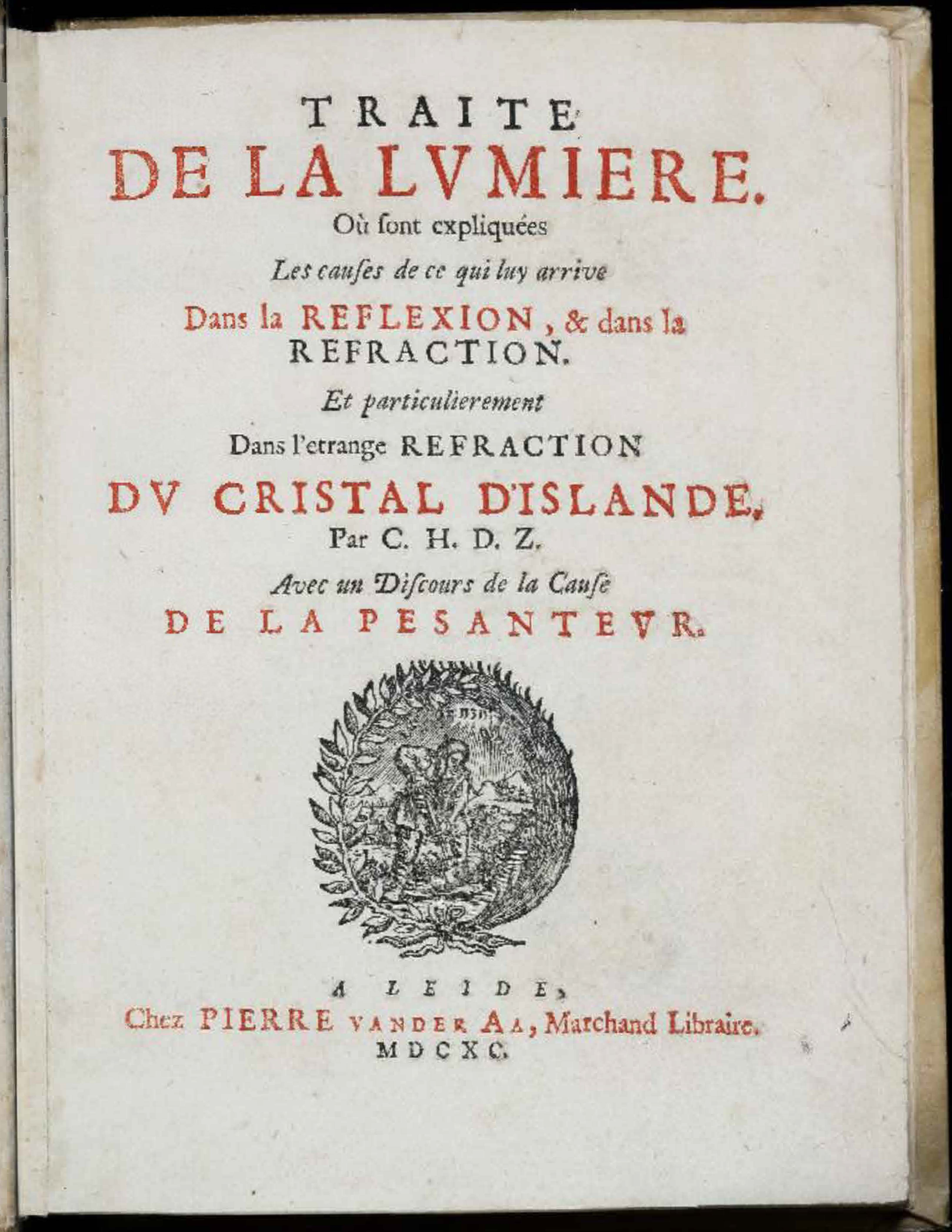 Traité de la lumière, où sont expliquées les causes de ce qui luy arrive dans la reflexion et dans la refraction, et particulierement dans l'etrange refraction du cristal d'Islande.